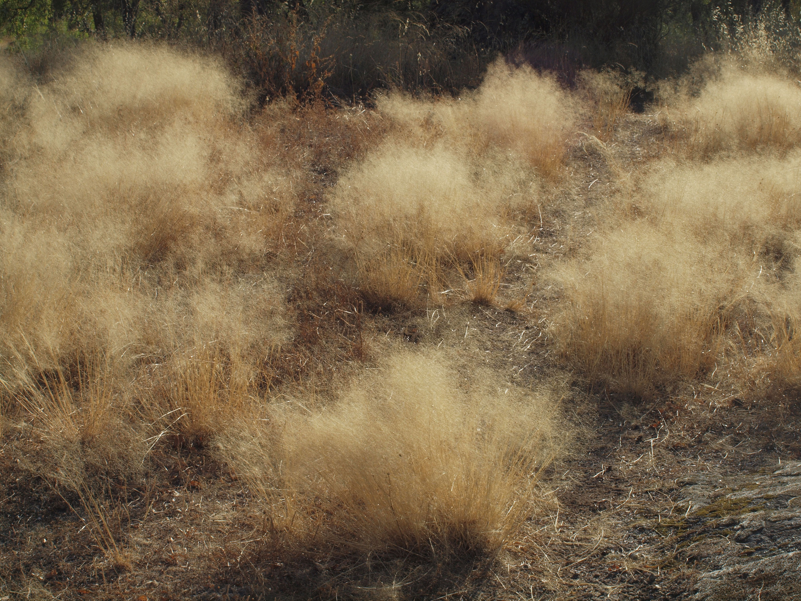 Agrostis truncatula, llamada localmente genillo. Losar de la Vera (Cáceres, España).